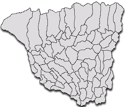 Categorie:Hărţi ale judeţului Gorj